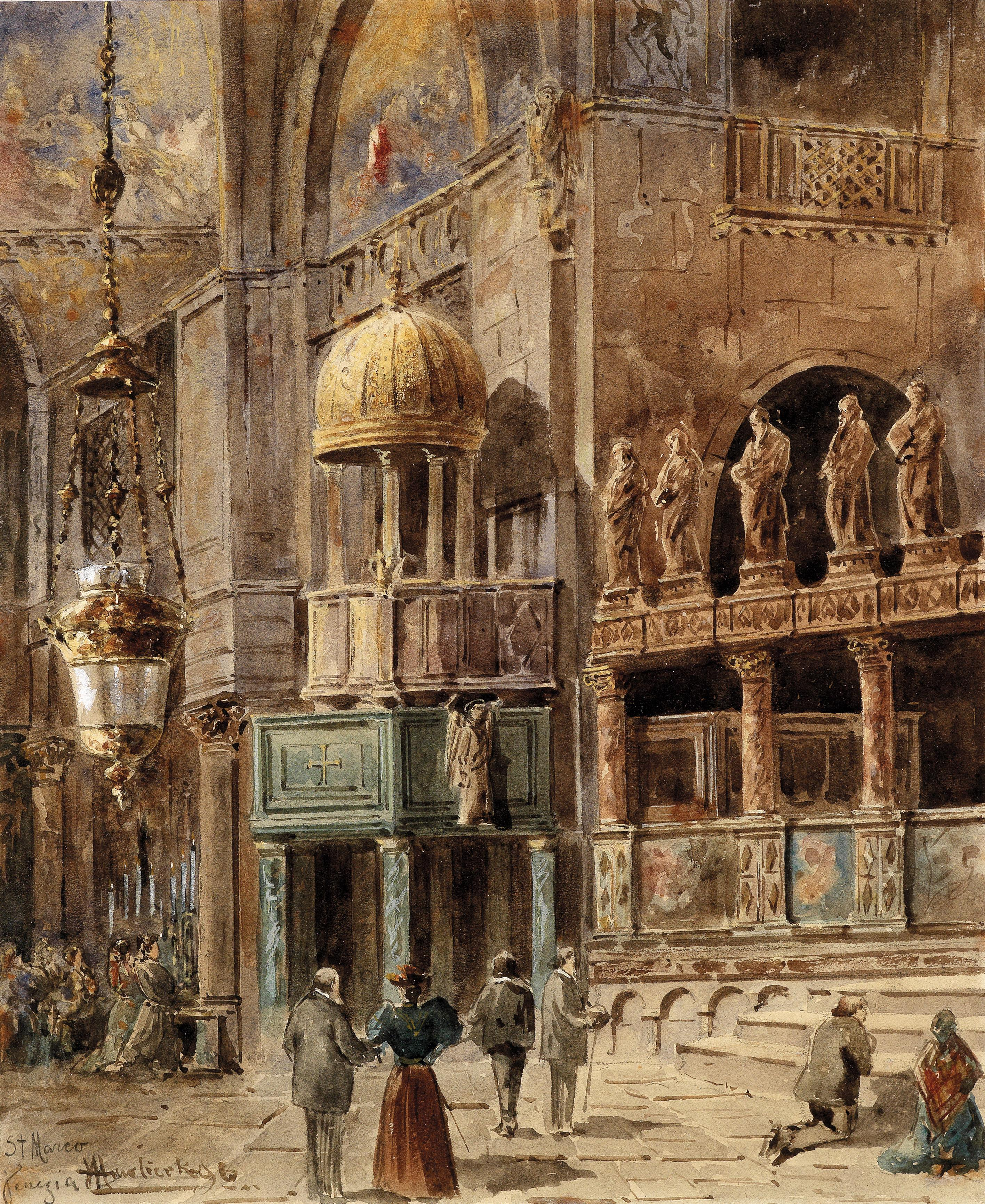 St. Marco, Venedig